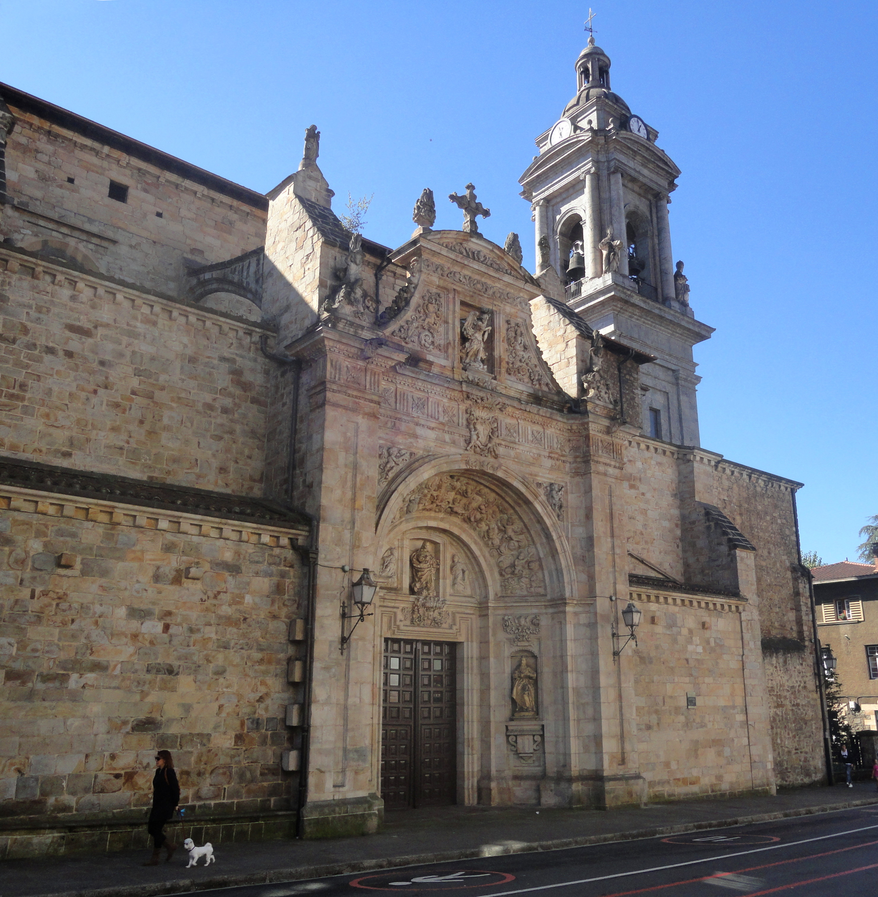 San Migel eliza - Oñati